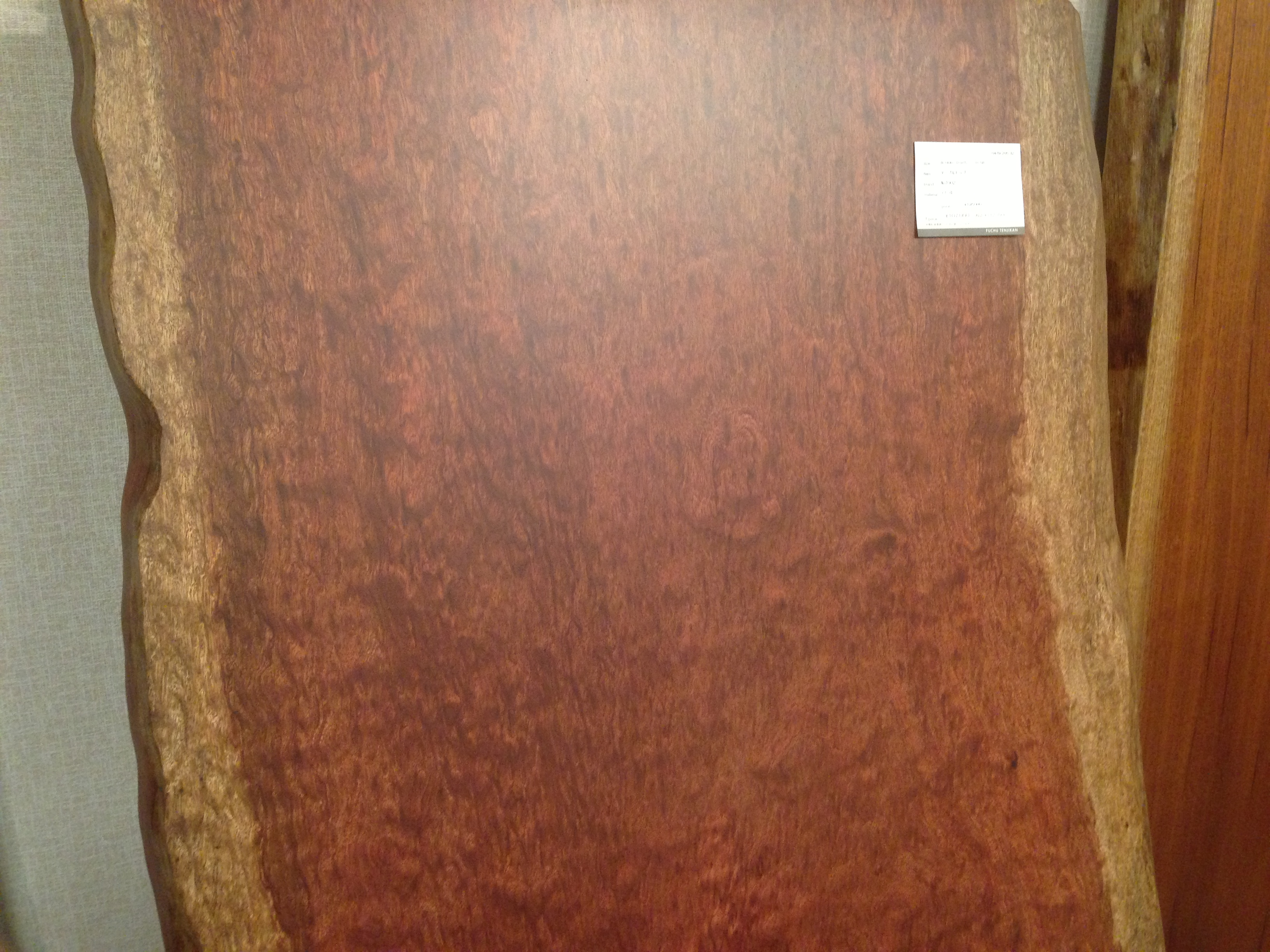 ブビンガの1枚板